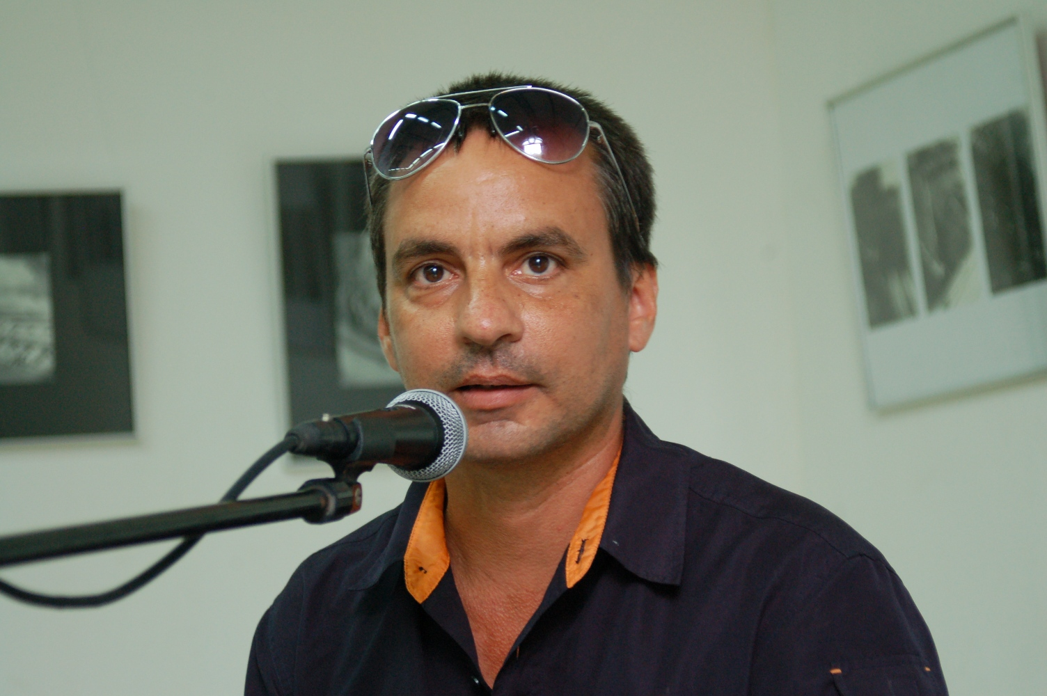 Escritor cubano Edelmis Anoceto Vega